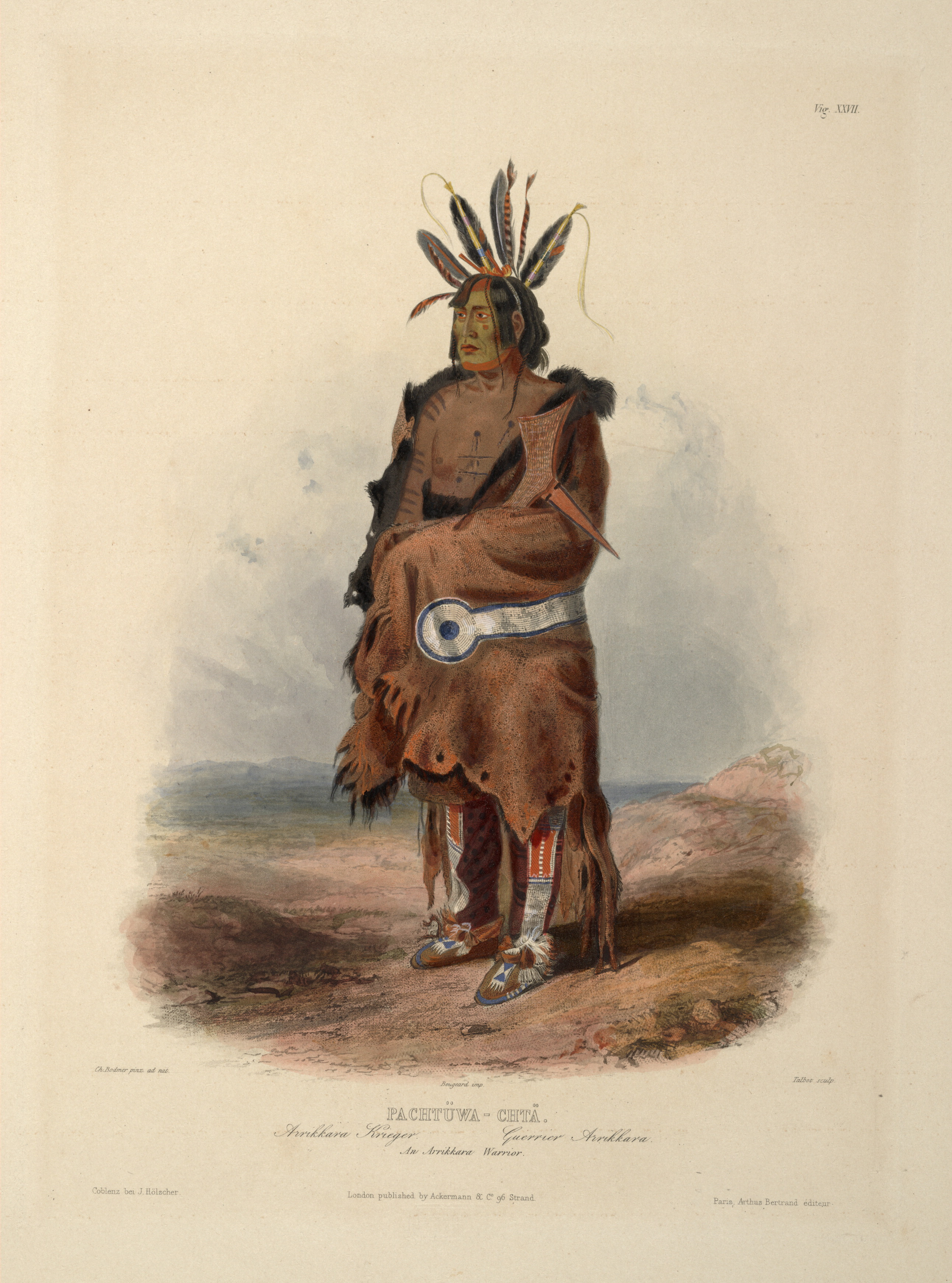 An Arrikara warrior